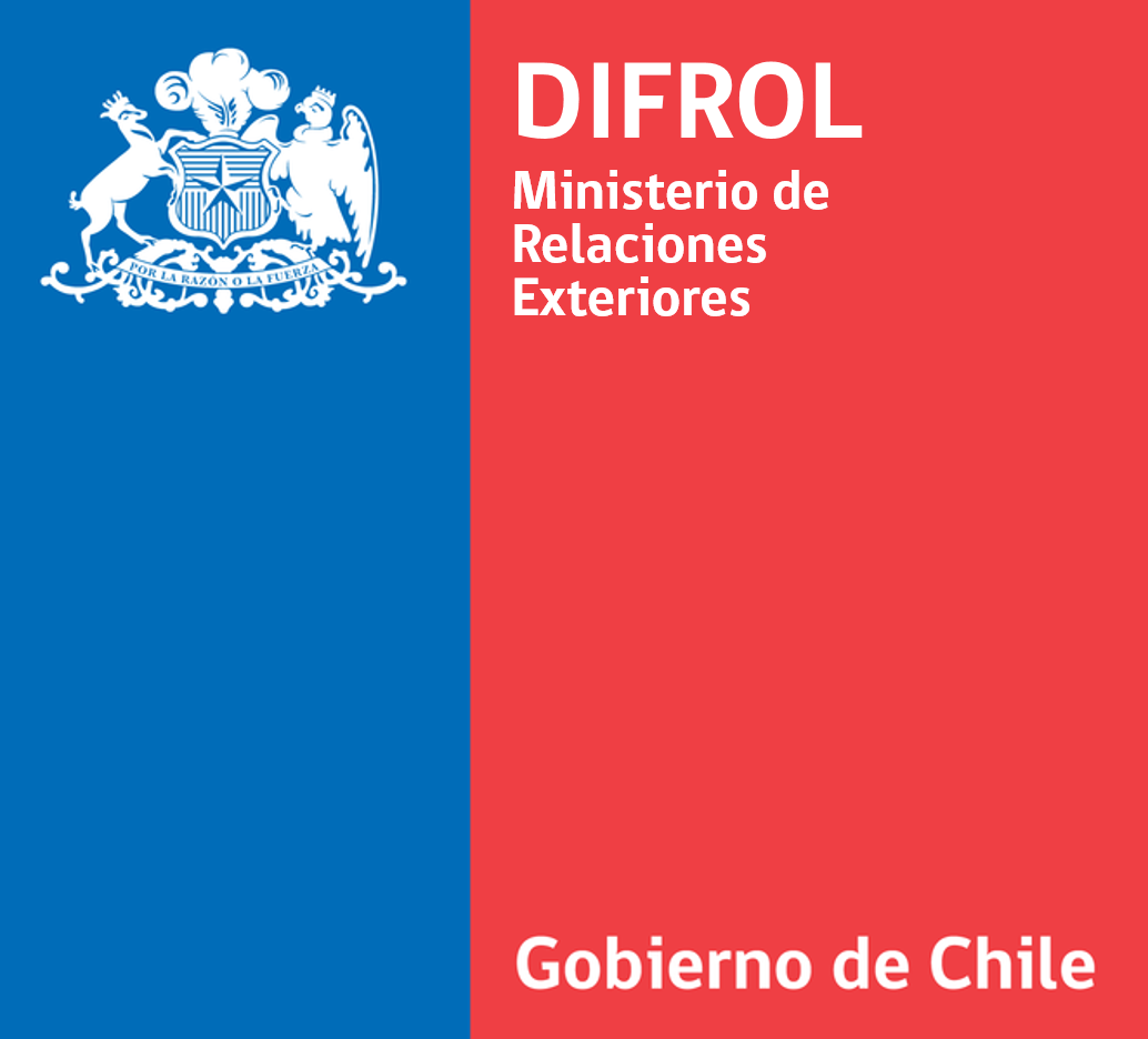 Logo institucional de la Dirección Nacional de Fronteras y Límites del Estado.